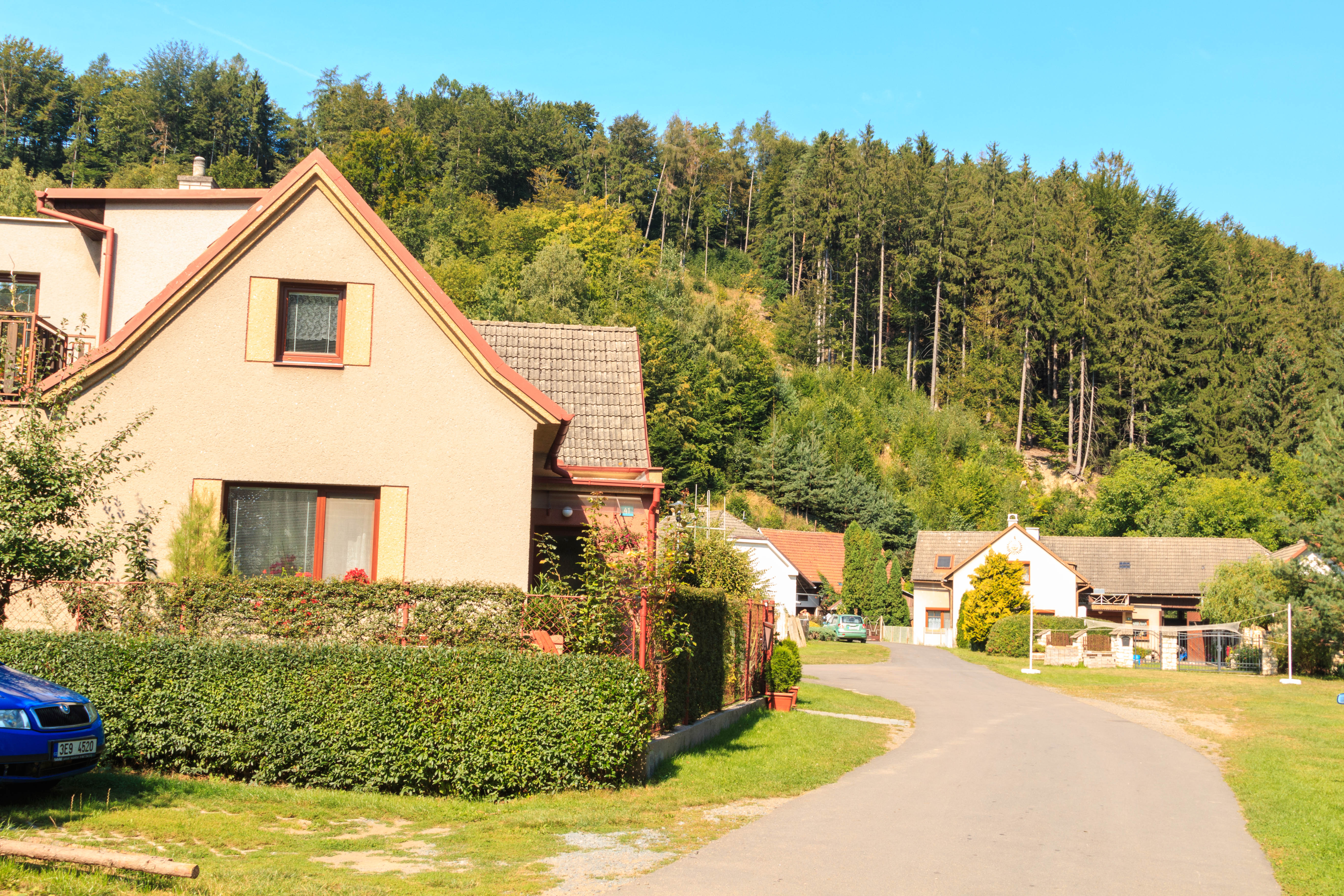 Doly u Luže - čp. 36